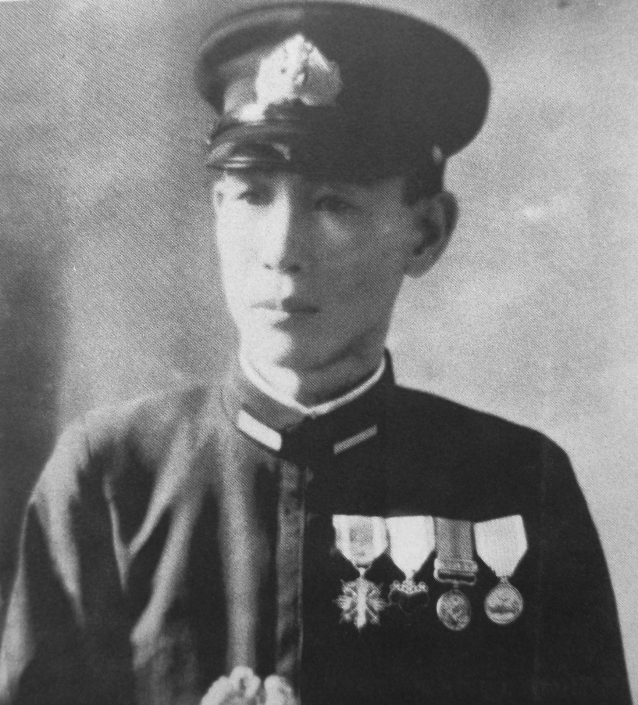 功5級金鵄勲章を授与された樫村寛一